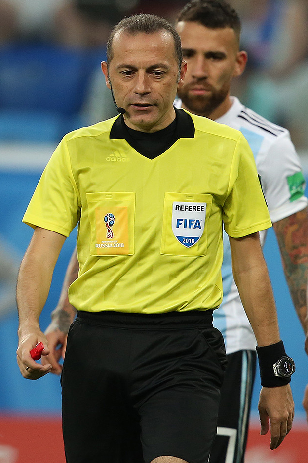 Гол Рохо в концовке выводит Аргентину в плей-офф чемпионата мира